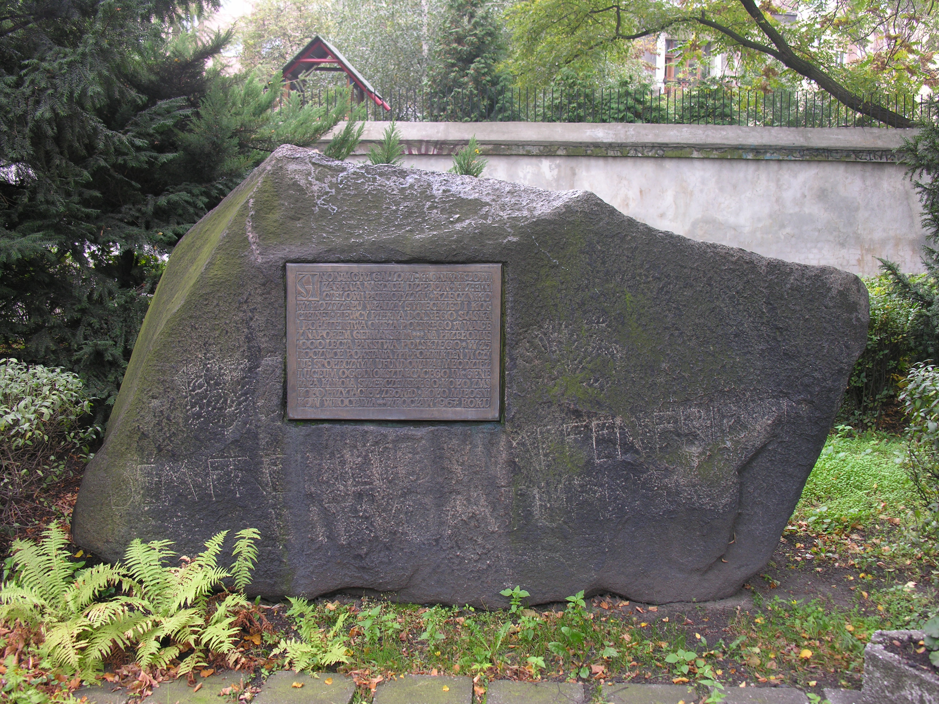 Kamień ku czci Galla Anonima na dziedzińcu I LO we Wrocławiu, ul. Poniatowskiego 9. Tekst na tablicy: Anonimowi Gallowi + kronikarzowi zarania naszych dziejów + krzewicielowi patriotyzmu + rzecznikowi rozdziału władzy świeckiej i kościelnej + piewcy piękna Dolnego Śląska i bohaterstwa oręża polskiego w walce z naporem germańskim +++ na przełomie 1000-lecia państwa polskiego + w 25 rocznice powstania PPR + pomnik ten w czynie społecznym ufundowała młodzieź I Liceum Ogólnokształtącego im. gen. Karola Świerczewskego + koło ZMS + koło przyjaciół ZBoWiD + koło miłośników Wrocławia + Wrocław 1967 roku